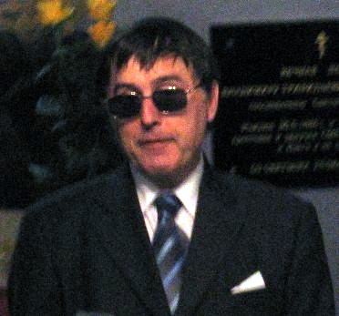 Josef Tomeš